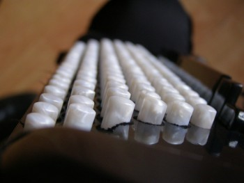 Ступенчатость левой руки клавиатуры Кравцова